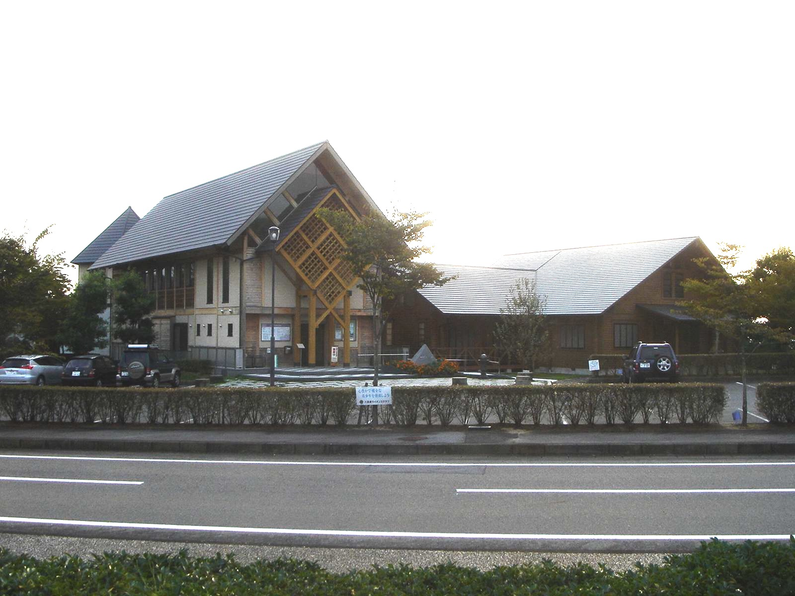 Sugihara_Chiune_Memorial_Museum(杉原千畝記念館,Yaotsu,Gifu,Japan(岐阜県八百津町)で撮影。